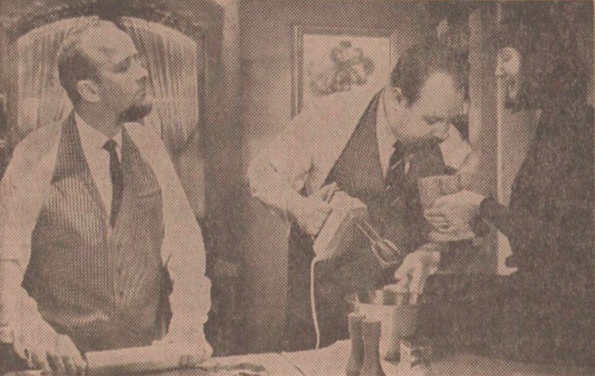 Hatte Furuhagen, Åke Söderqvist och Monica Nielsen (1965). Presentation av deltagare inför julens "julstökare" i TV.